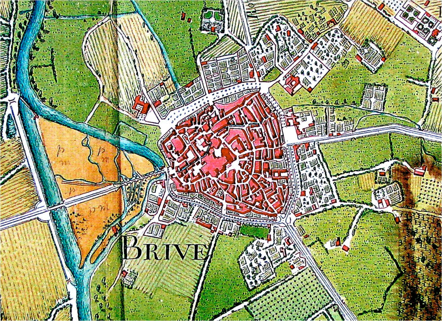 Plan tiré de l'Atlas de Trudaine, vers 1760 (Archives nationales, CP/F/14/8484, page 62). Le nord est à gauche du plan